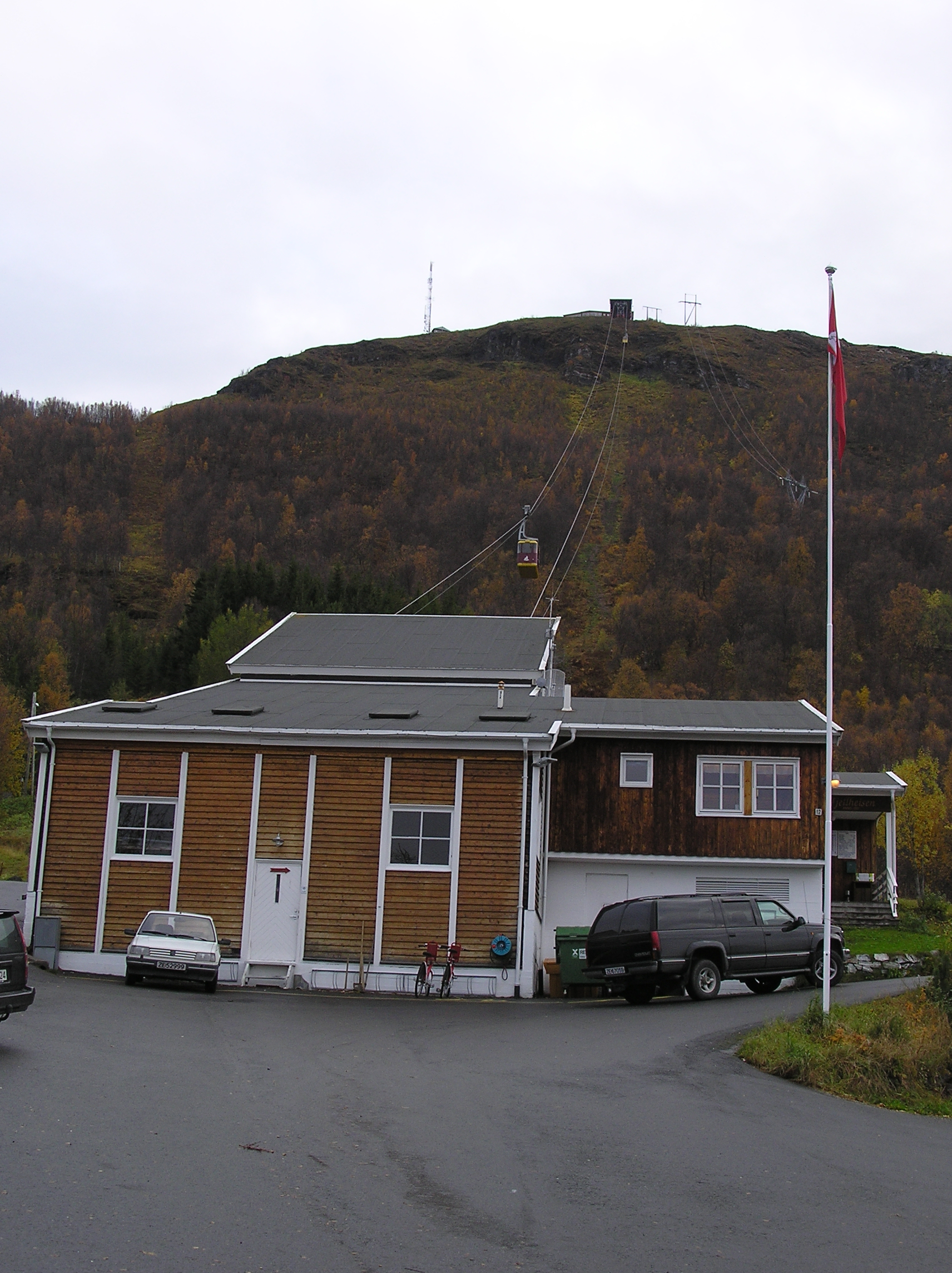 Luftseilbahn Fjellheisen Tromsø